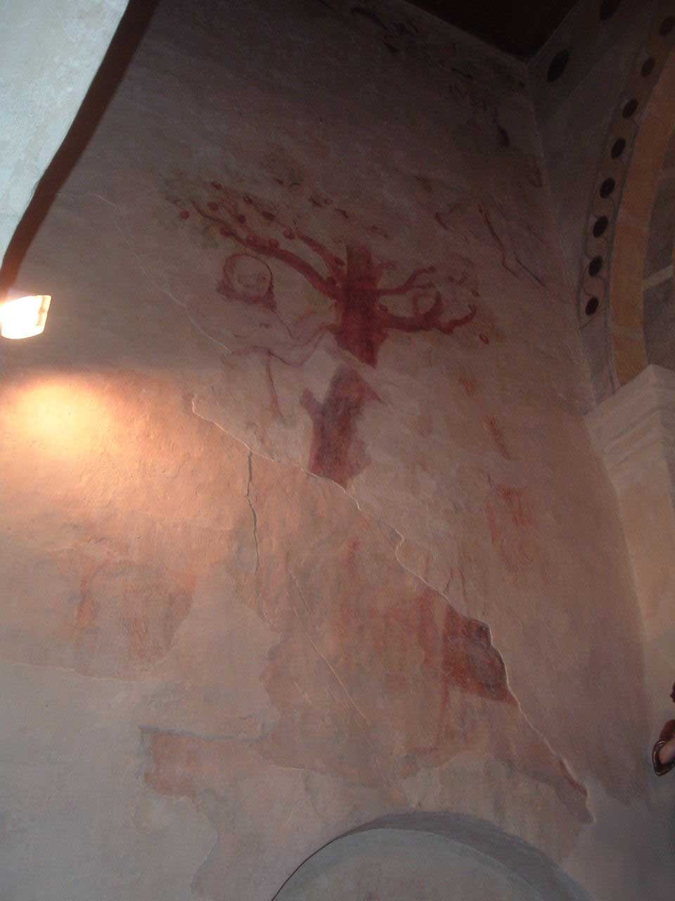 A Szent Mihály arkangyal tiszteletére szentelt 13. századi román stílusú templom freskója Csempeszkopácson